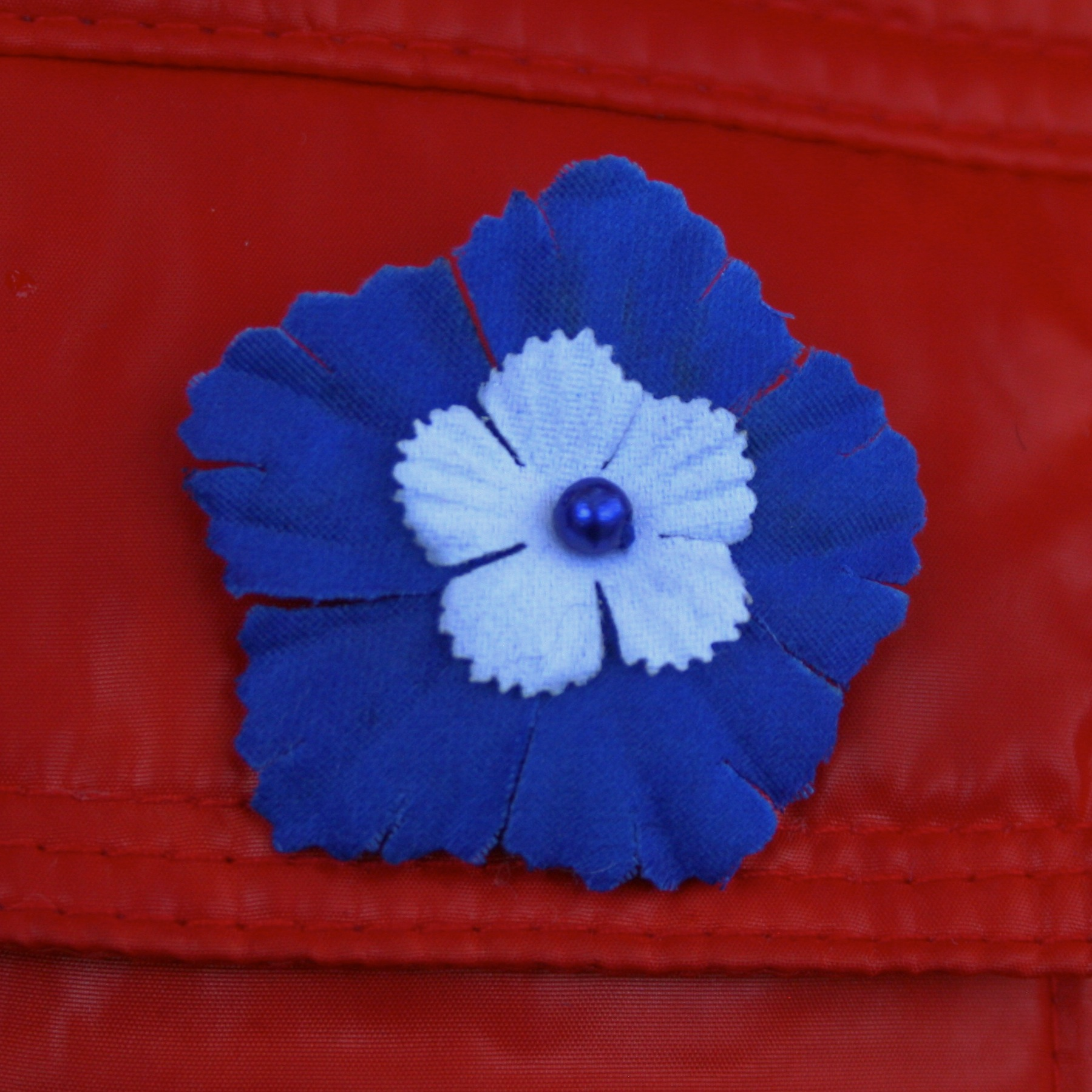 Bleuet de France version 2012